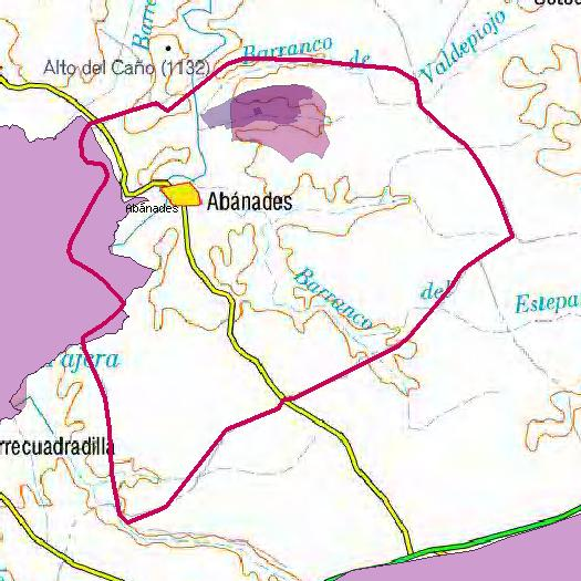 Mapa del Ayuntamiento de Abánades, con LICs y microreserva.